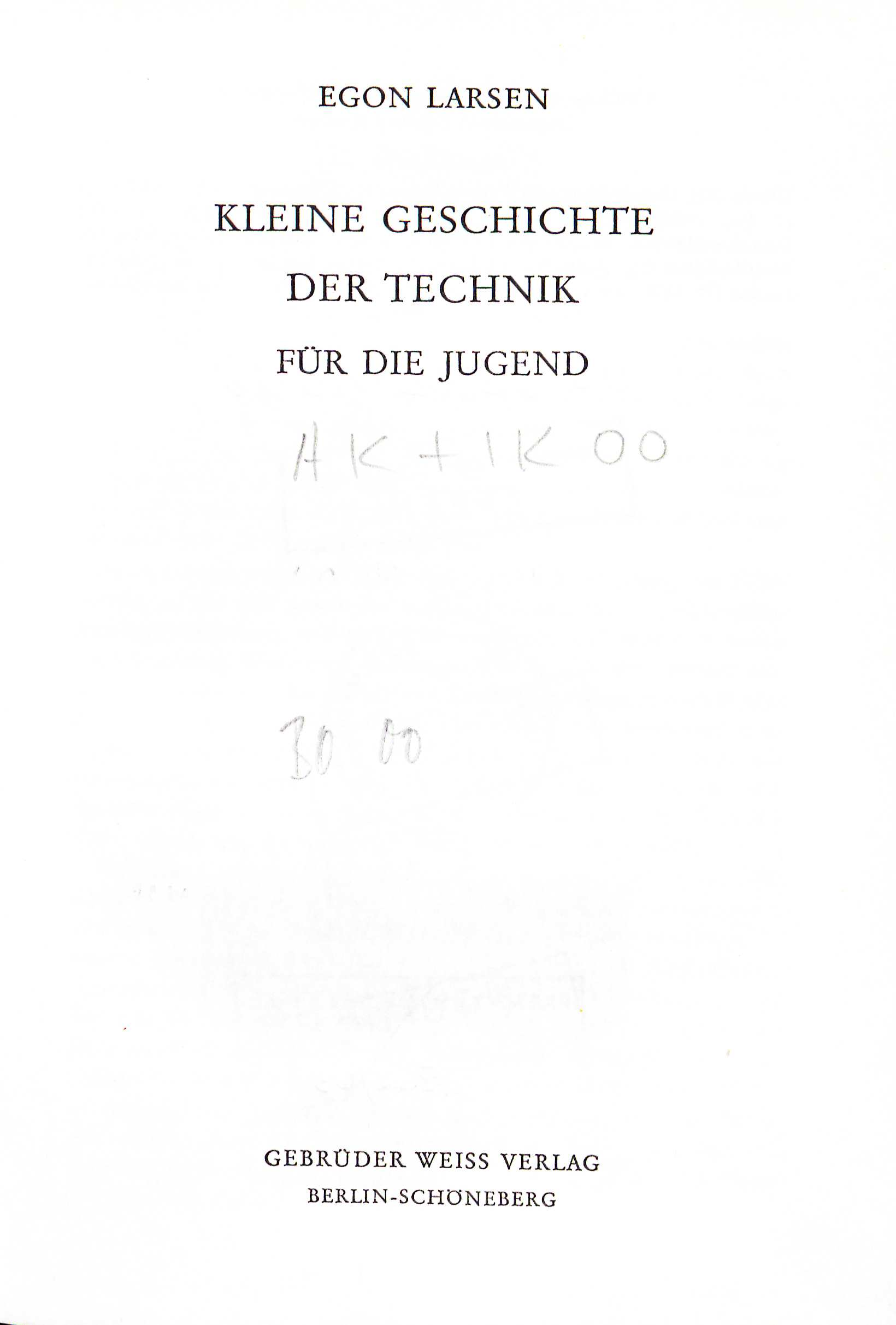 Egon Larsen Kleine Geschichte der Technik für die Jugend. Berlin : Weiss, 1961 Titelseite